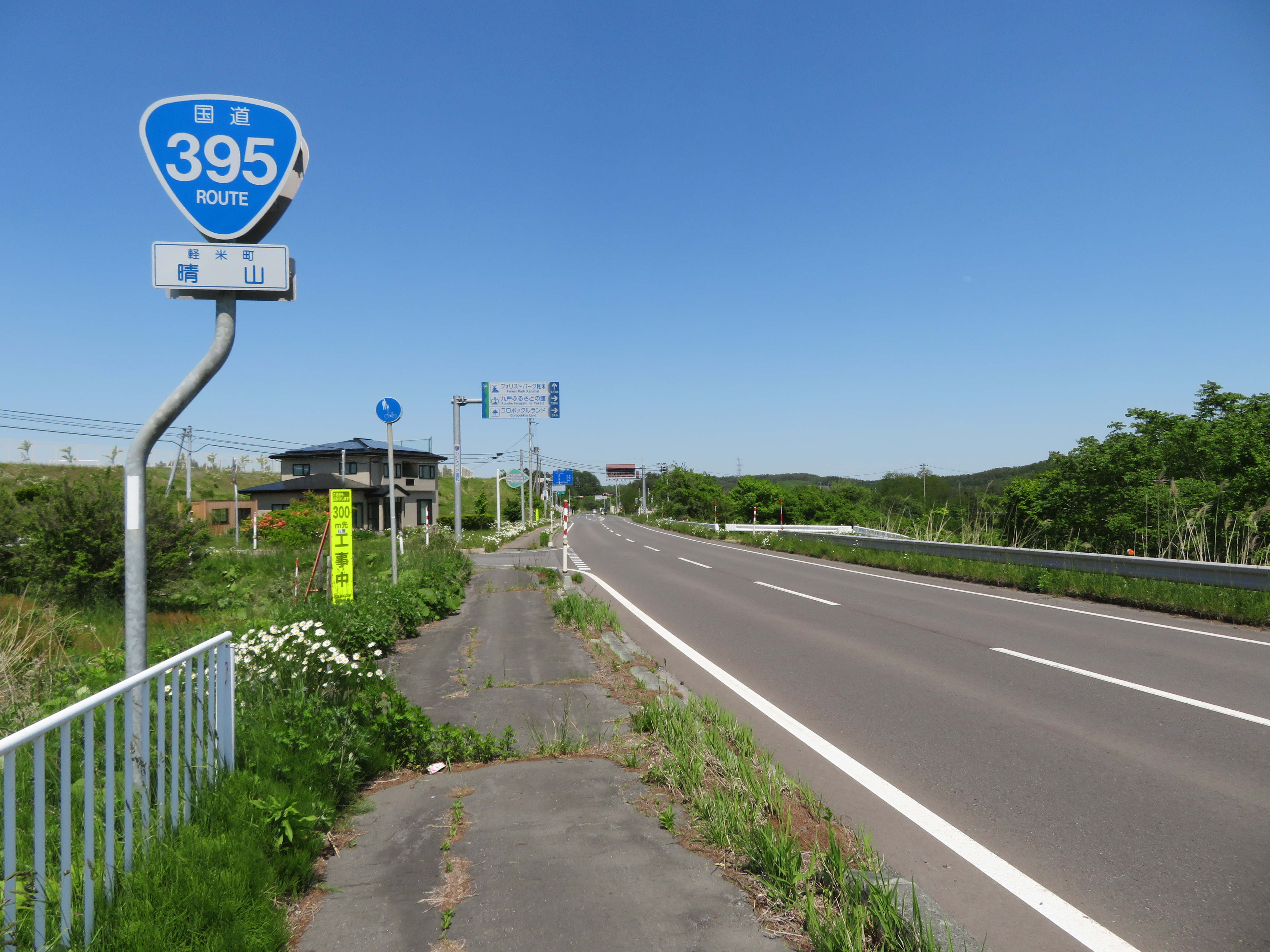 国道395号觀音林バイパス岩手県九戸郡軽米町晴山第23地割付近（久慈方面を撮影） Canon PowerShot SX720 HS